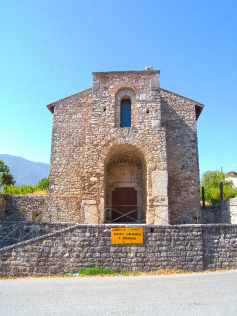 Abbazia longobarda di Sant'Anastasia, Ponte (BN)